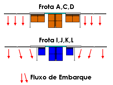 Fluxo de Embarque e Disposição de bancos entre frotas A,C,D I,J,K,L